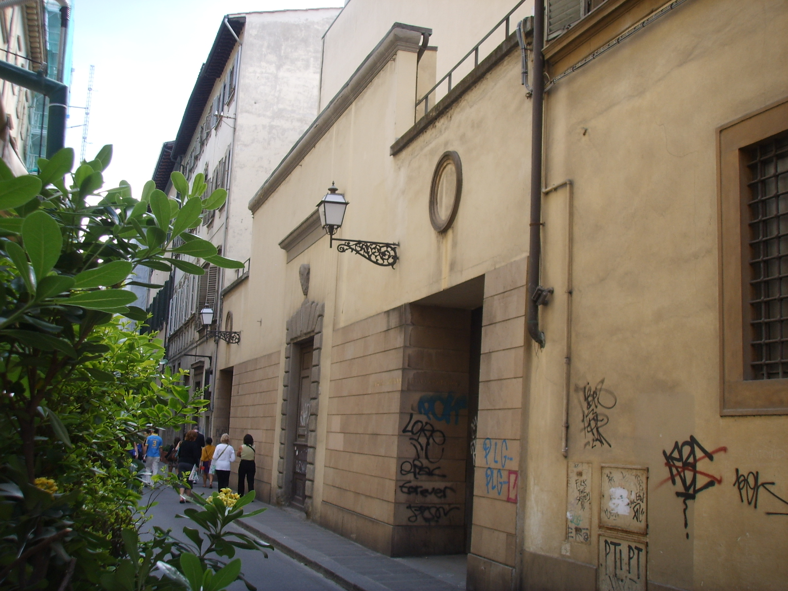 Teatro della compagnia, retro su via ricasoli